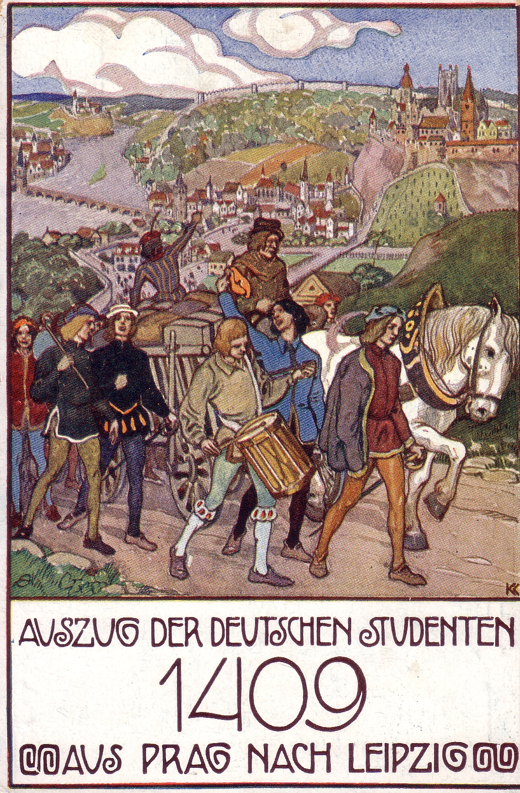 Auszug der deutschen Studenten aus Prag.